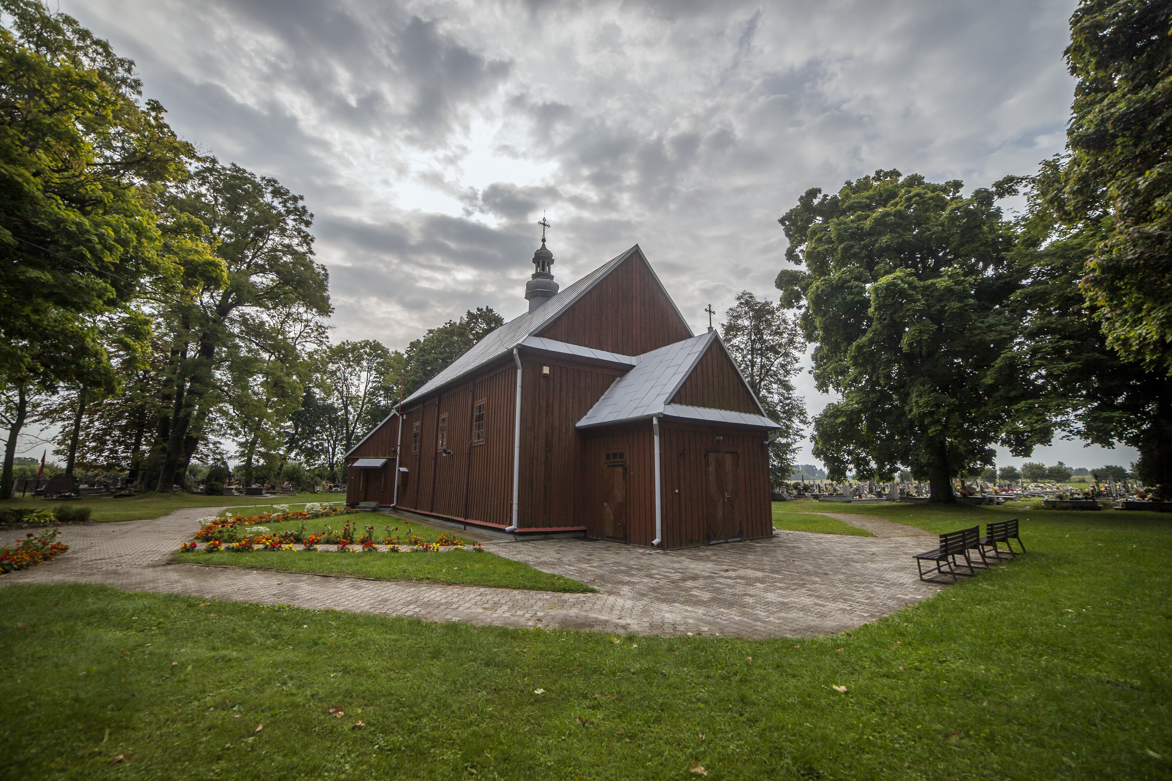 Świerszczów, cerkiew gr.-kat., ob. kościół rzym.-kat. par. pw. św. Bazylego, 1 poł. XIX